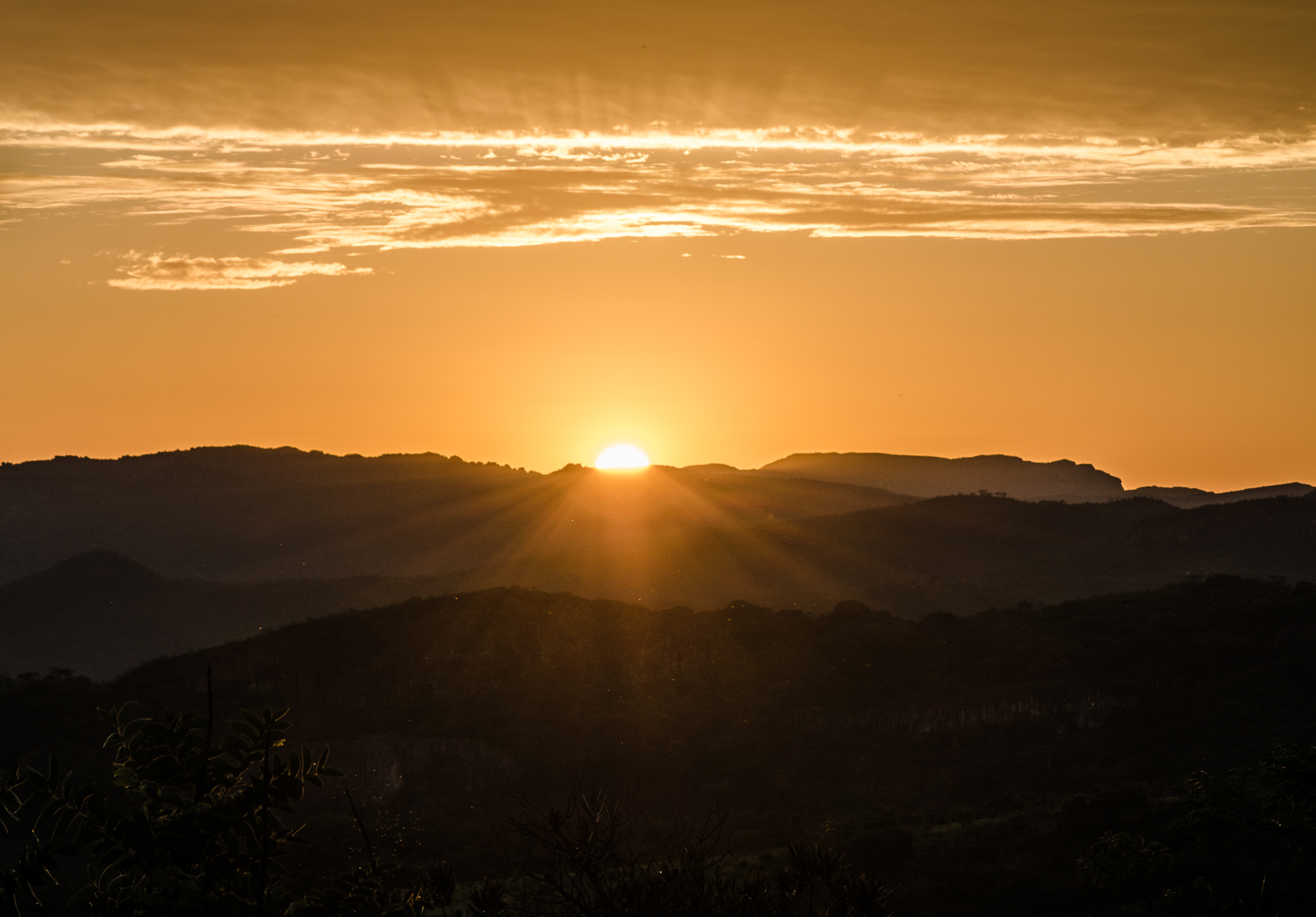 Nascer do sol em montanhas do Vale do Jequitinhonha.